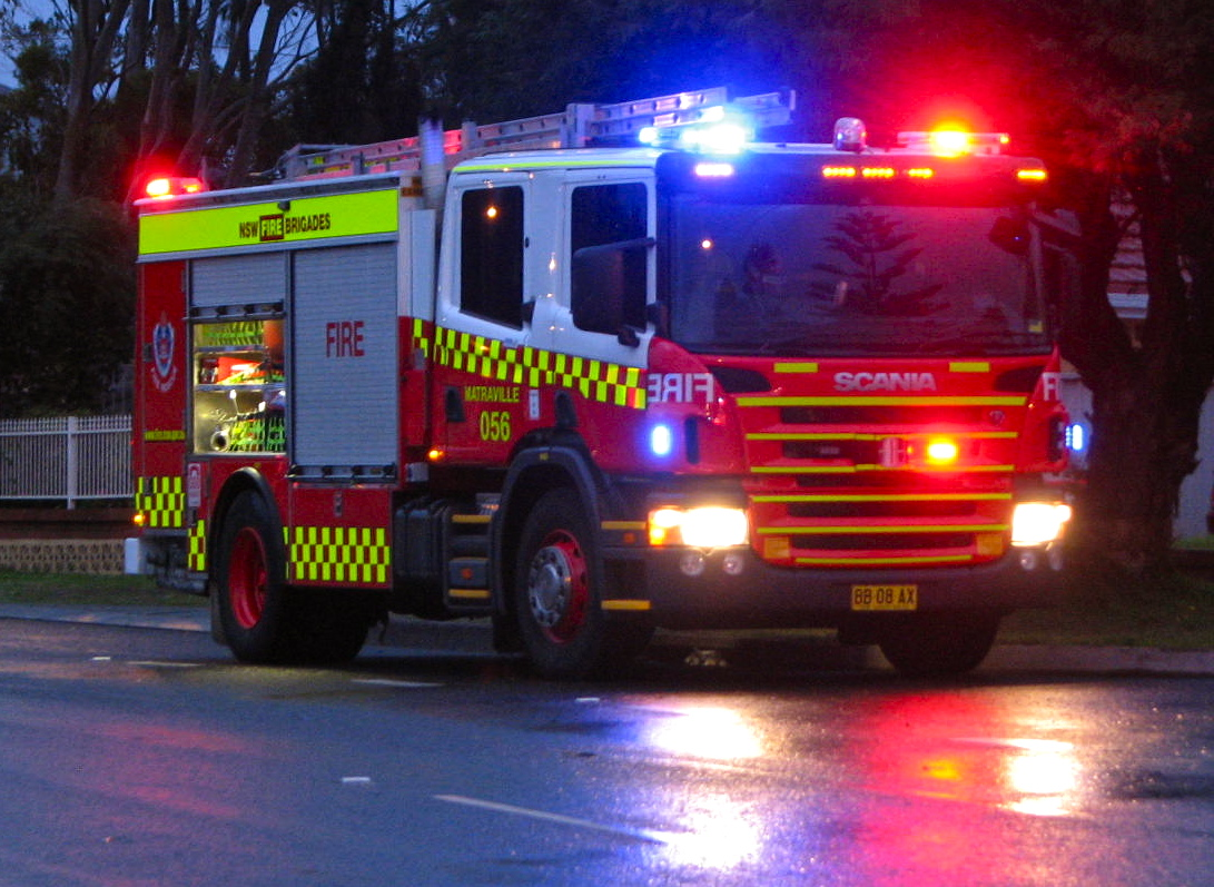 Matraville 056